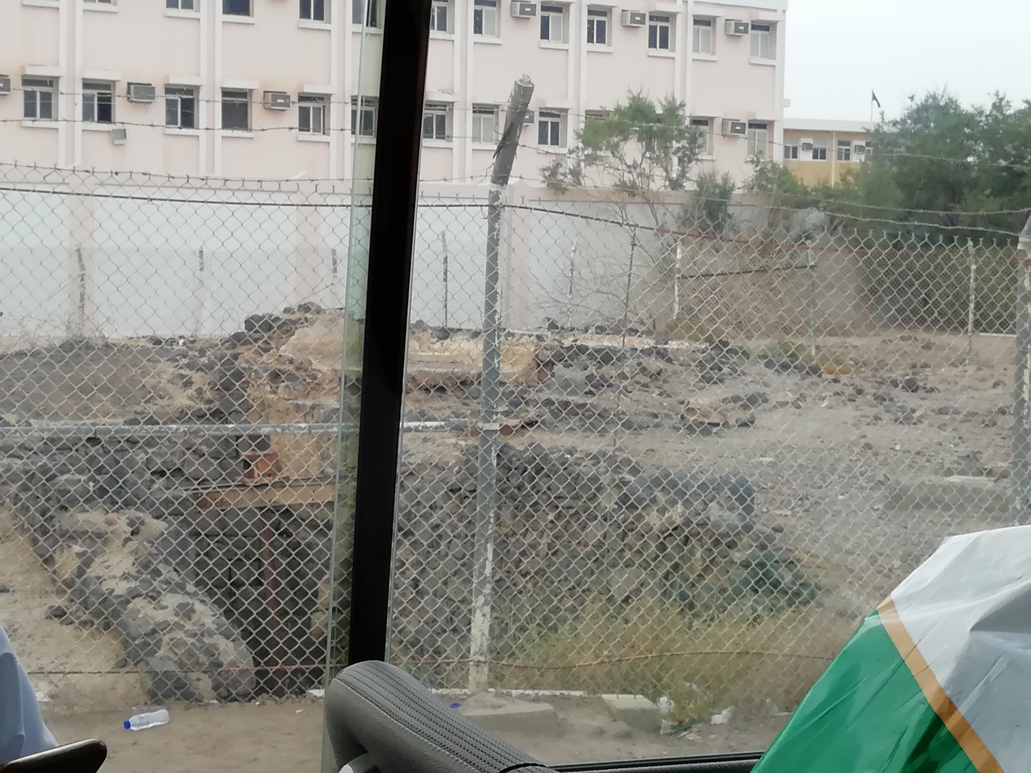 al-Madinah al-Munawarah Awaly district al-Faqir well of Salman al-Farsi بئر الفقير لسلمان الفارسي وفي الخلفية ثانوية الأمير محمد بن عبد العزيز